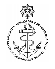 Sello SOHMA